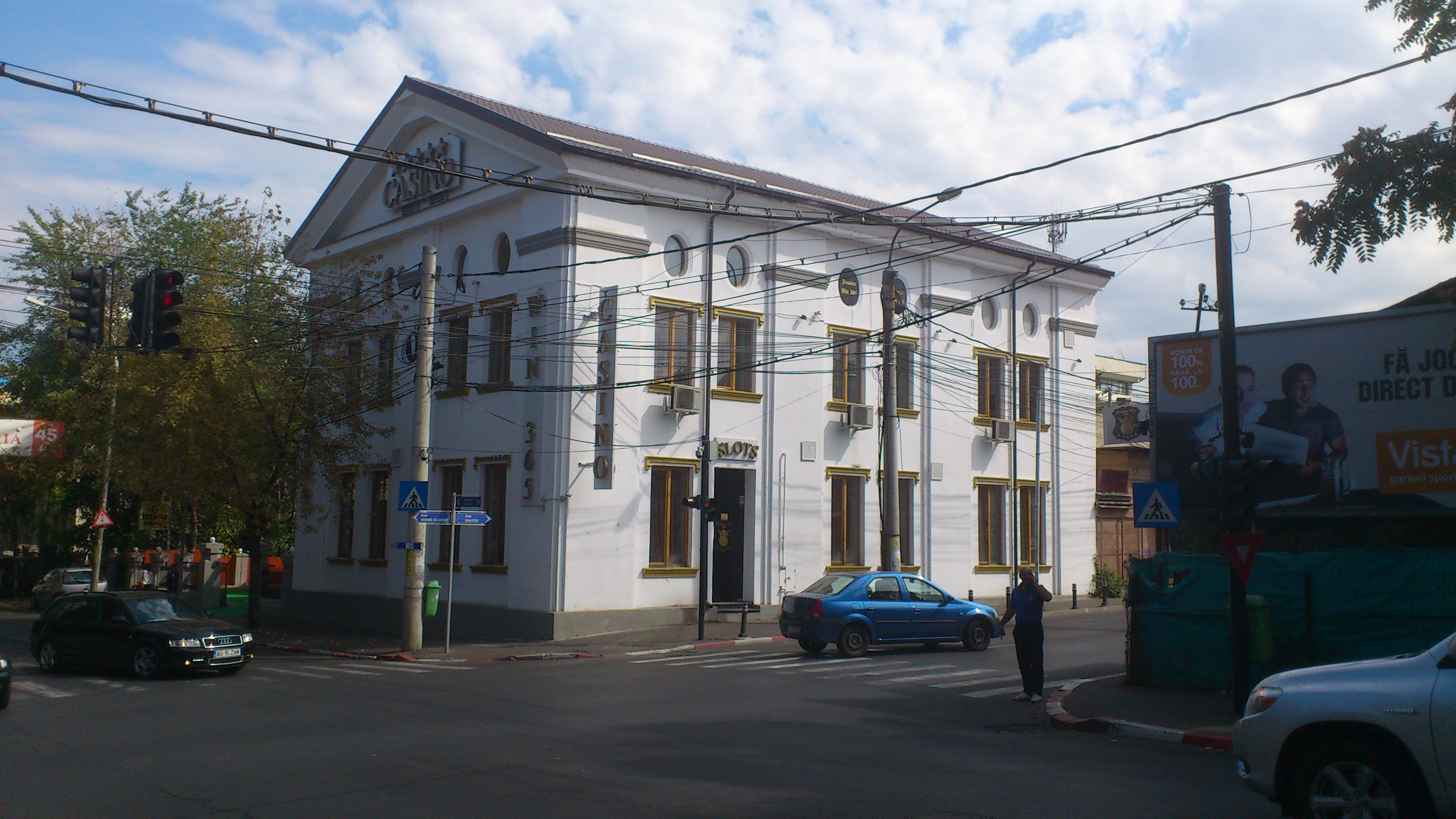 Fosta școală a comunității evreiești